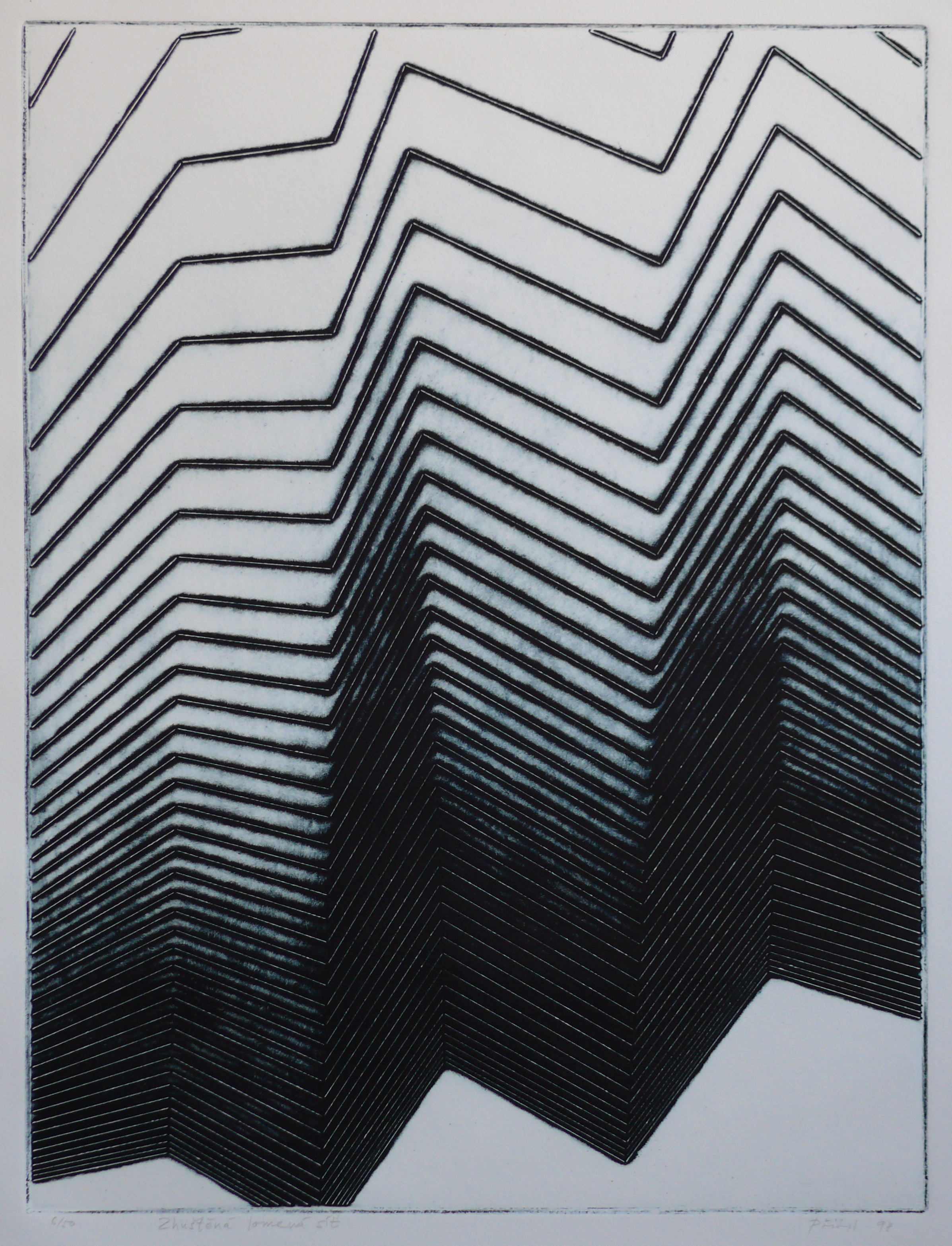 Lubomír Přibyl, ZHUŠTĚNÁ LOMENÁ SÍŤ, kolografie 1998